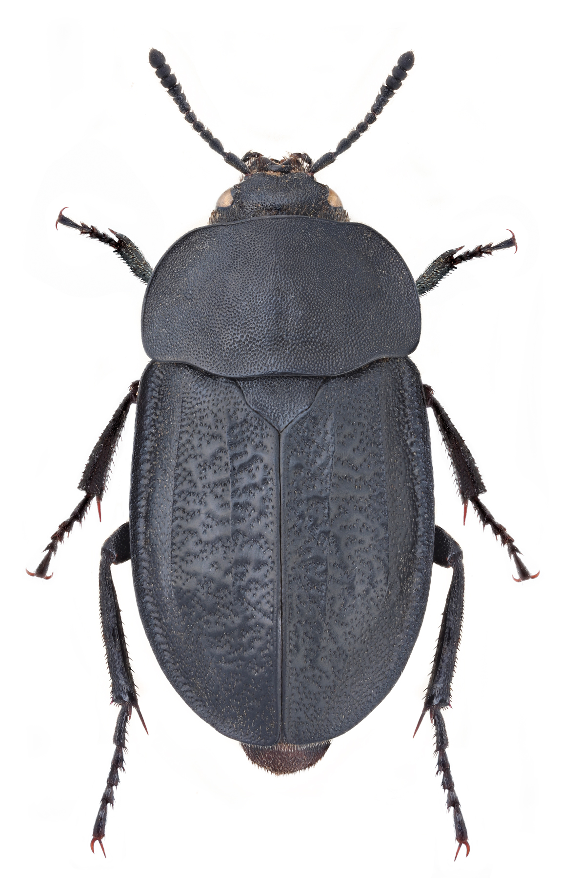 Aclypea undata